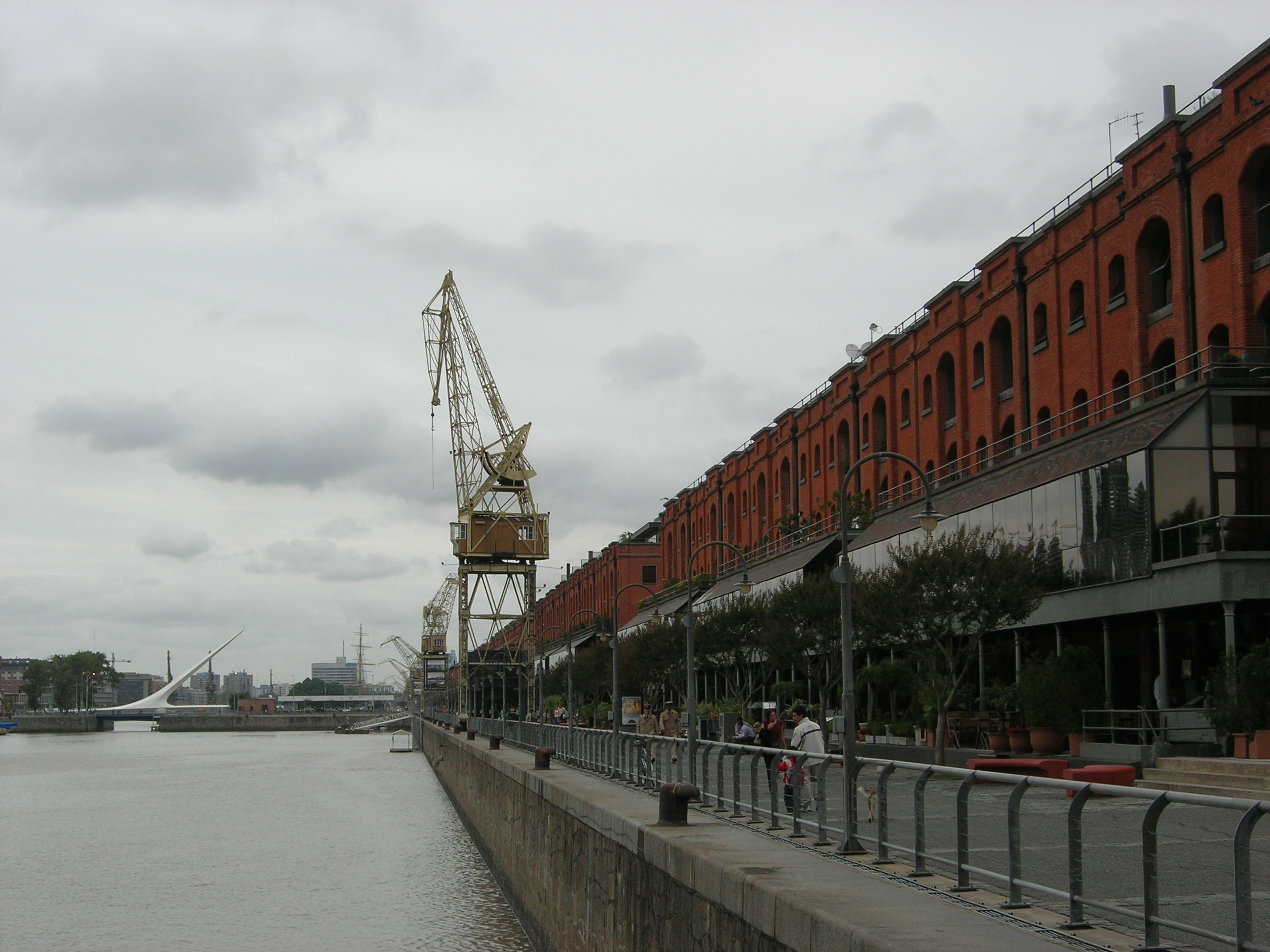 Puerto Madero, port de Buenos Aires (Argentine). Les anciens docks.